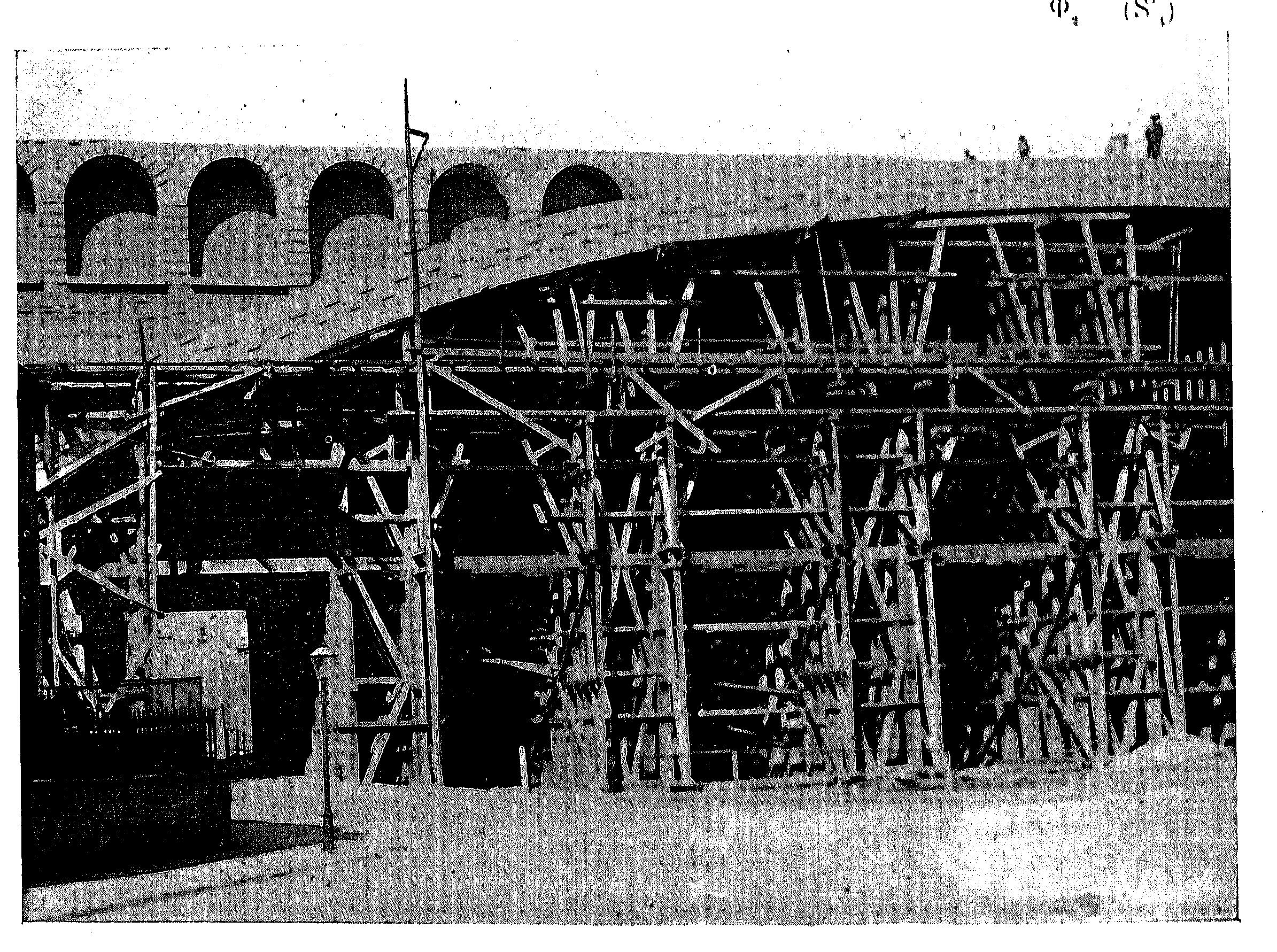 Viaduc du Syratal – Plauen – Allemagne – Photo du cintre en cours de montage.